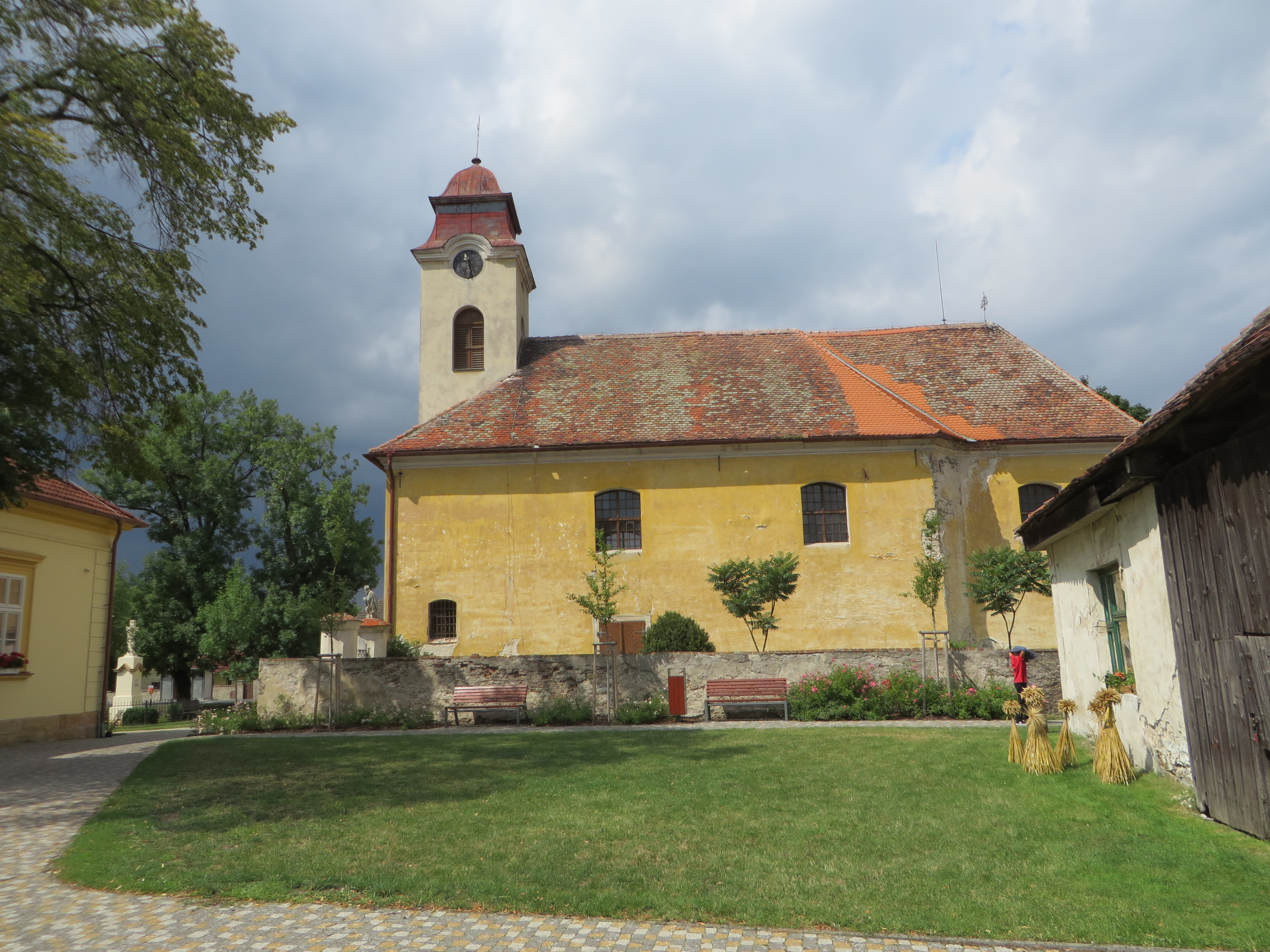 Kostelní Lhota během soutěže Entente Florale Europe. 2017